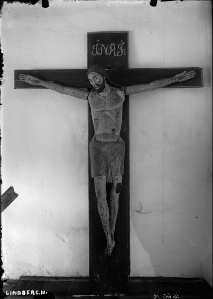 Krucifix av snidat trä, 1400-tal. Snabbinv. Kategori: (05) KrucifixKrucifix av snidat trä, 1400-tal. Snabbinv.